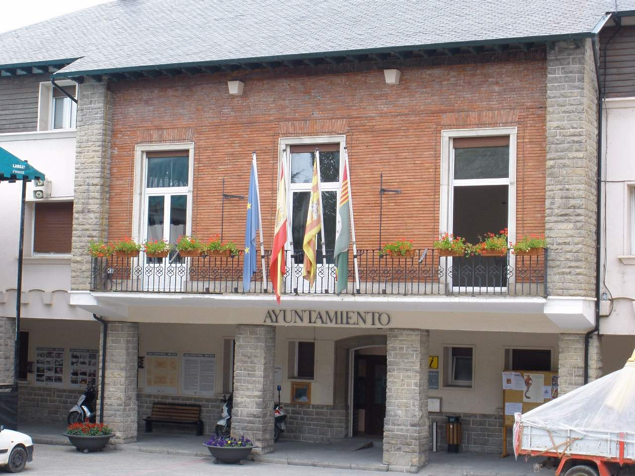 Sabiñanigo - Plaza de España